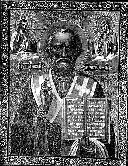 Образ Святителя Мурликийского Чудотворца, сооружённый в 1893 г. в память боя под Иканом 4, 5 и 6 декабря 1864 г.